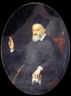 Ritratto del venerabile Francesco Gonzaga.